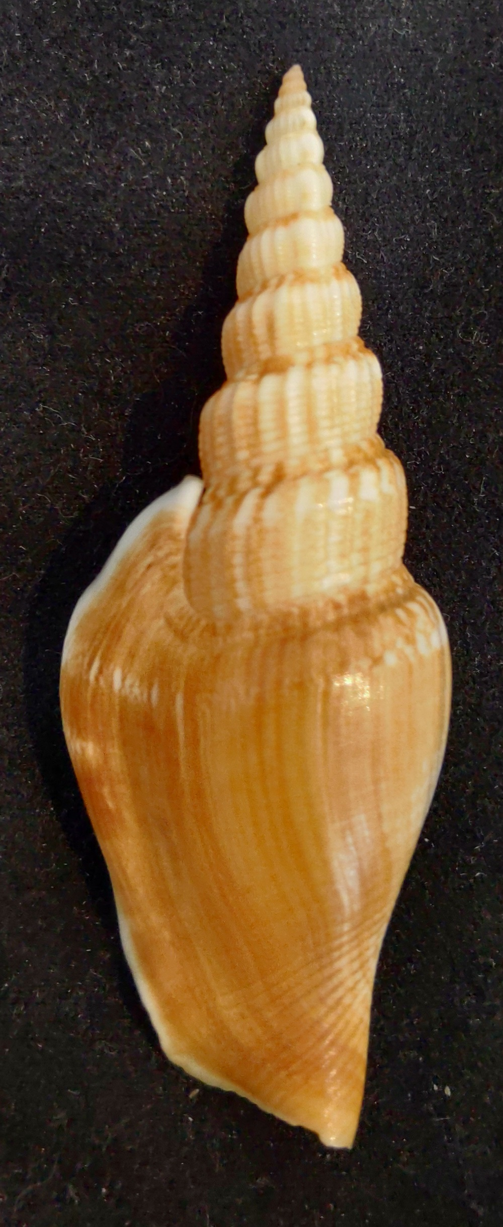 Doxander Entropi Back